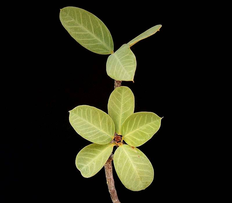 Euphorbia socotrana